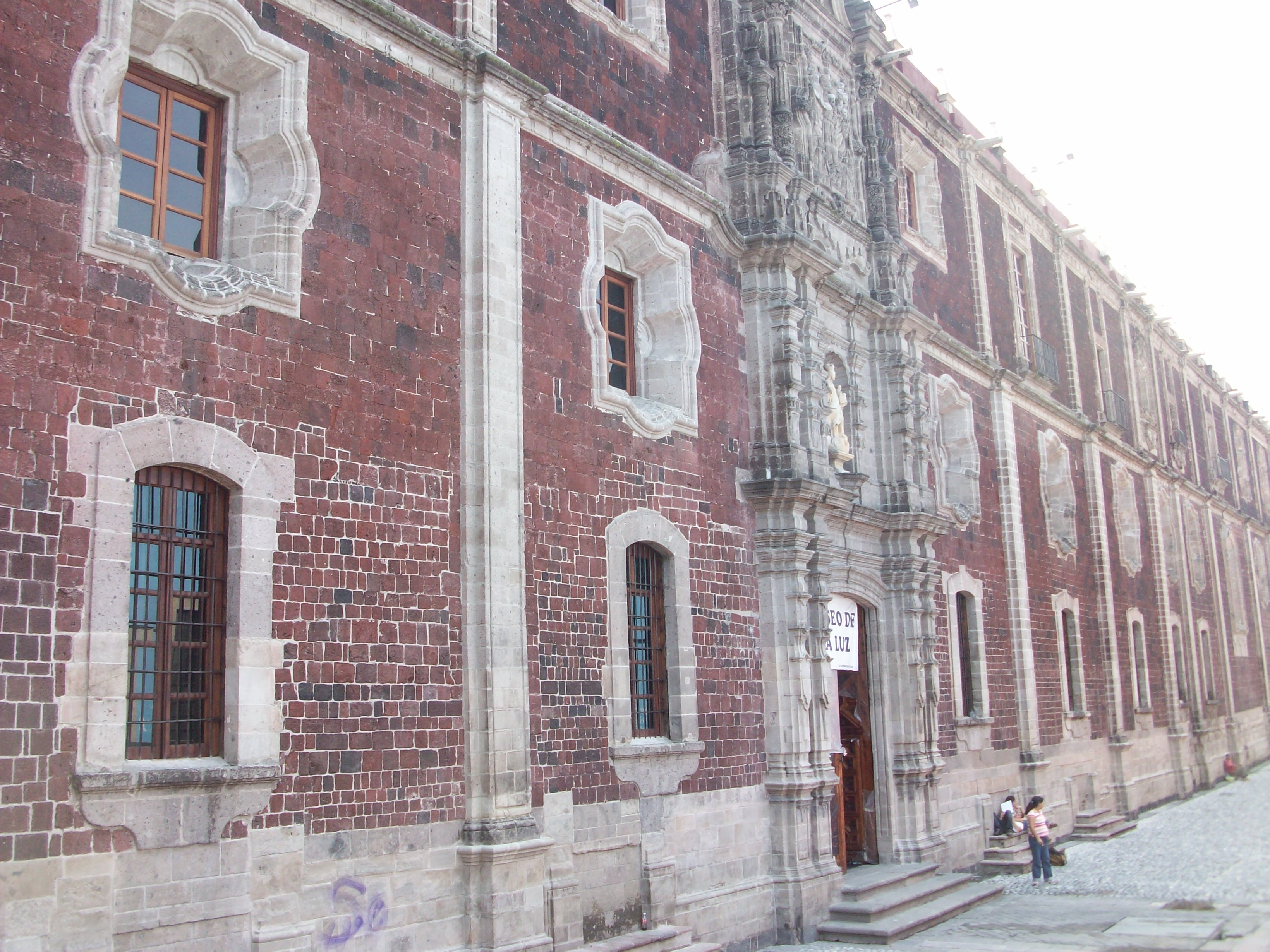 Colegio de San Ildefonso